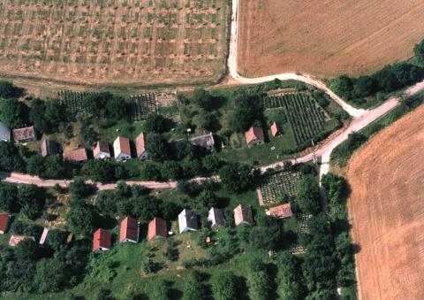 Bakonygyirót, Hungary, aerial photography